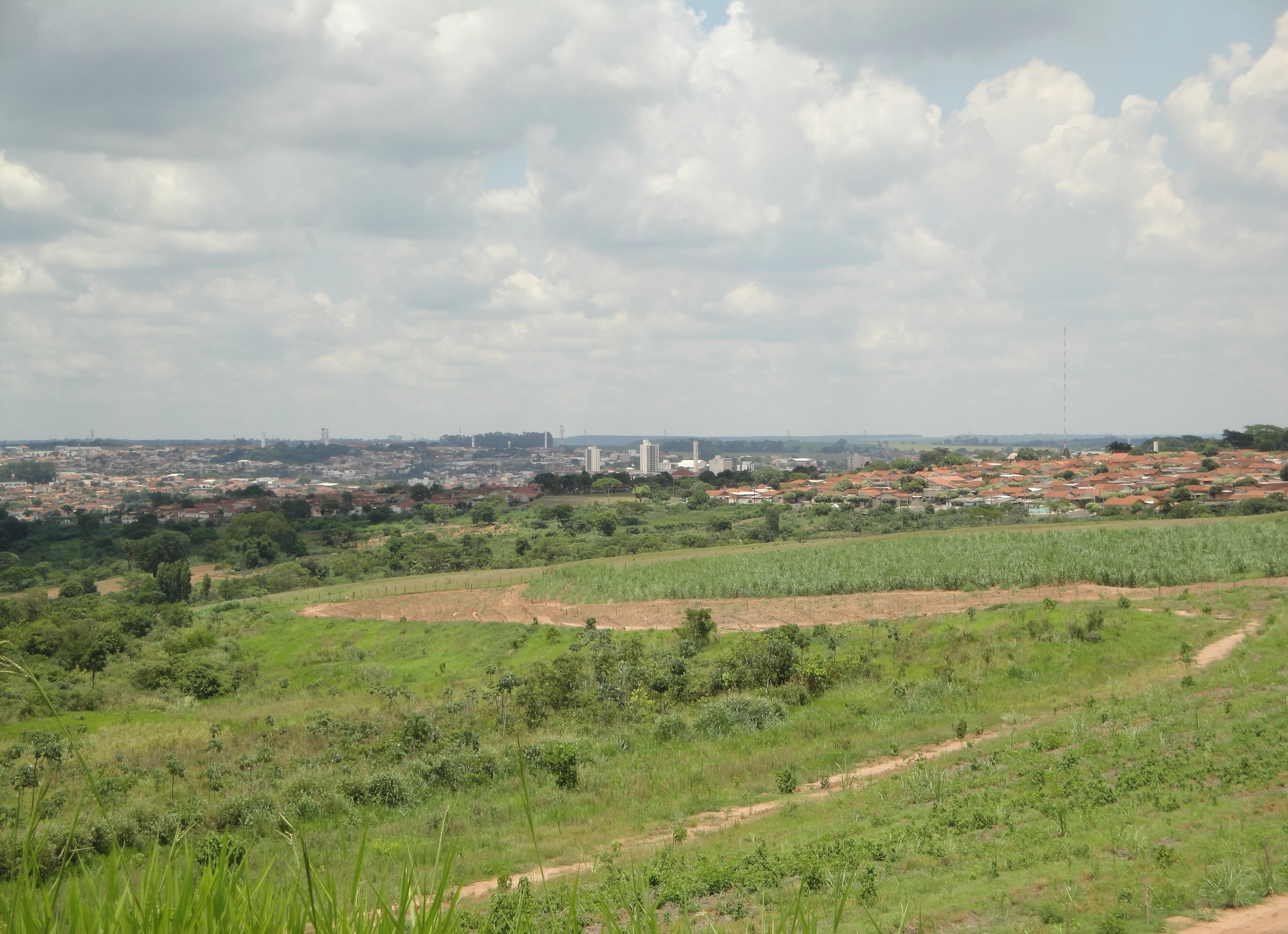 Cidade de Matão, vista do trevo de acesso a cidade de Motuca na Rod. Brig. Faria Lima SP-326